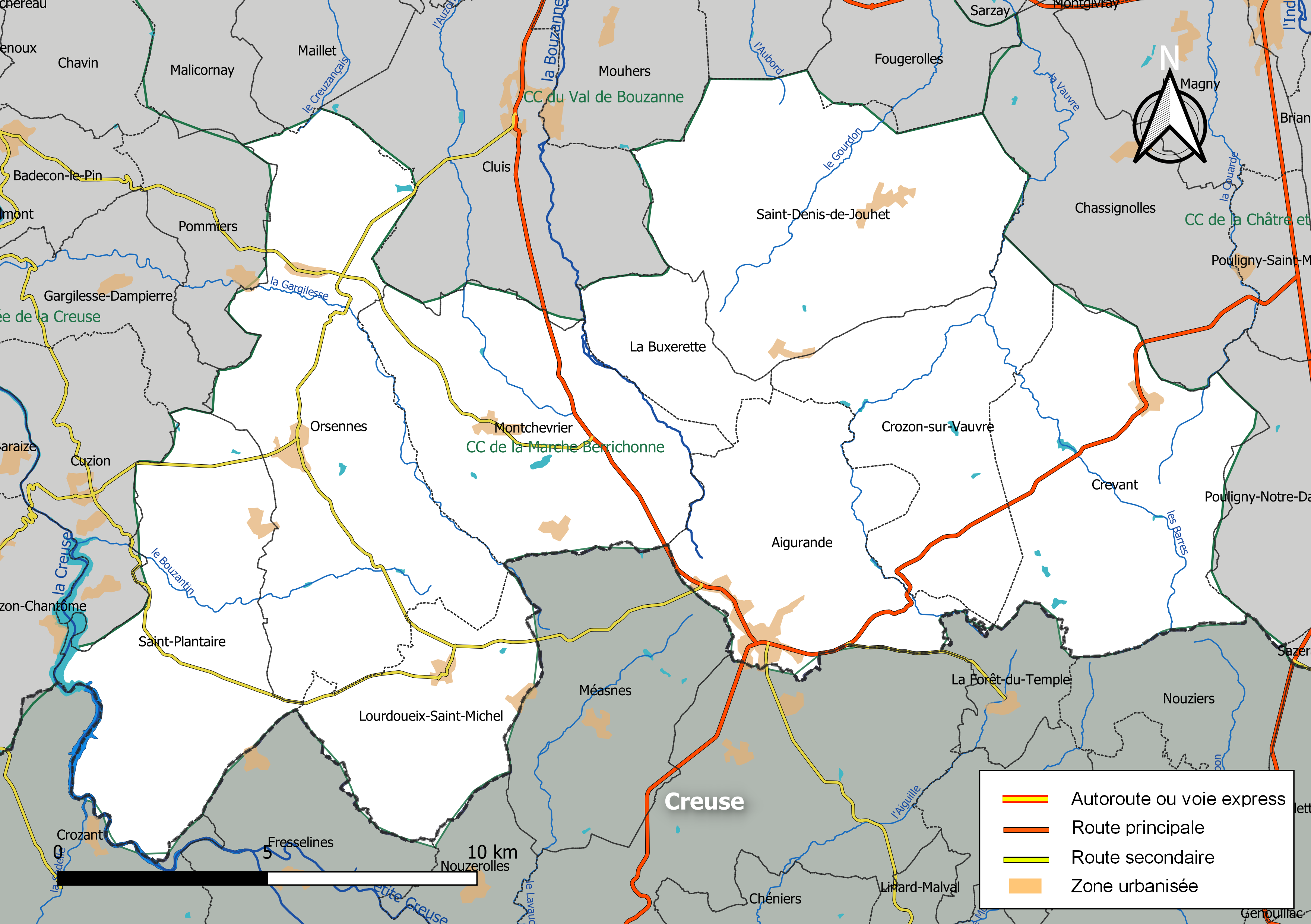 Carte de la communauté de communes de la Marche berrichonne, département de l'Indre, France. Composition au 1er janvier 2019.